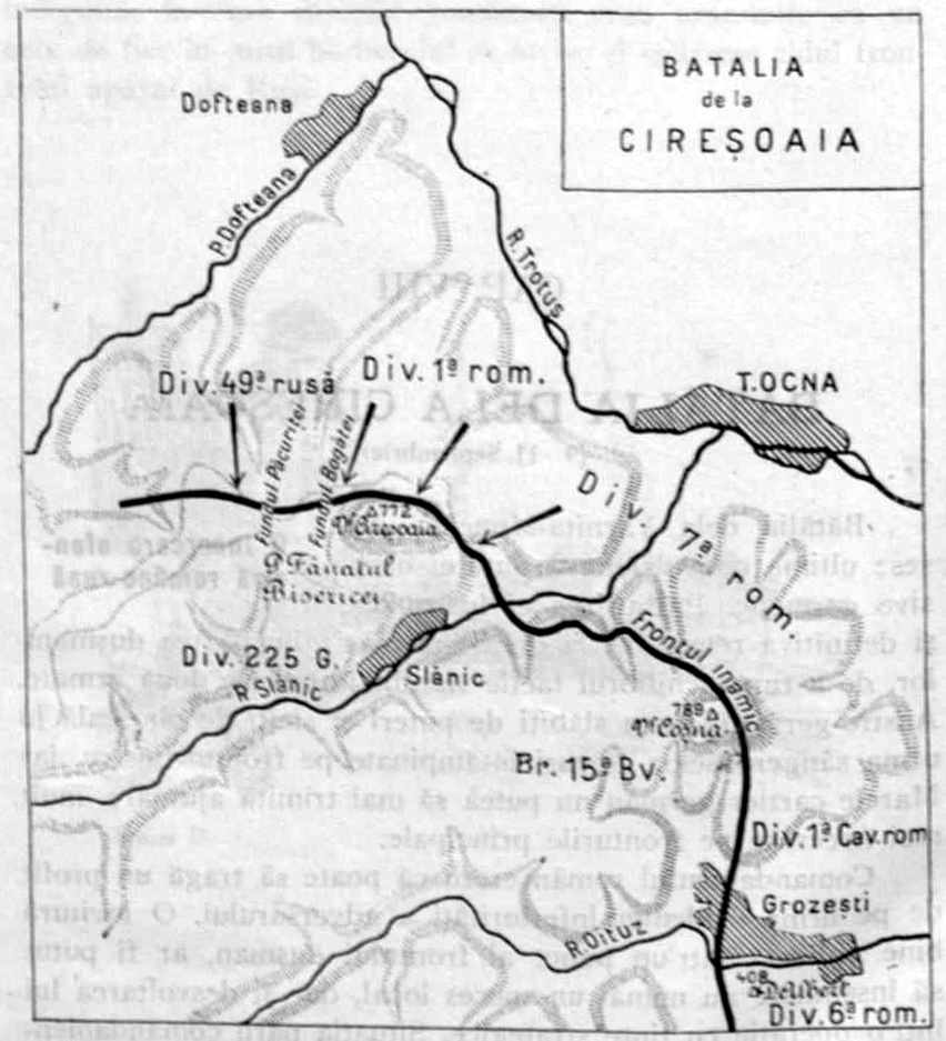 D - Harta lupta de la Ciresoaia 1917 - Kiritescu II 670